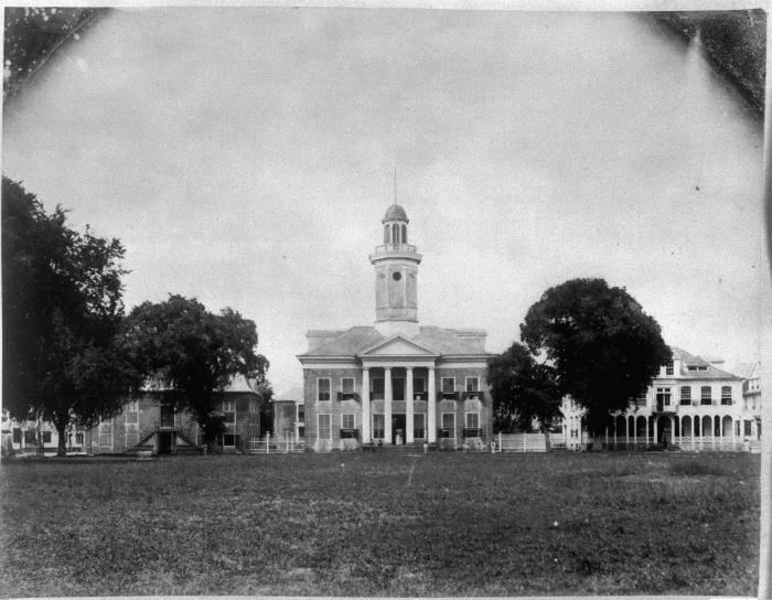 Foto. De afgebeelde gebouwen zijn die van de Gouvernementssecretarie, administratie en het gerechtshof.. Bestuursgebouwen aan het Gouvernementsplein, Paramaribo.